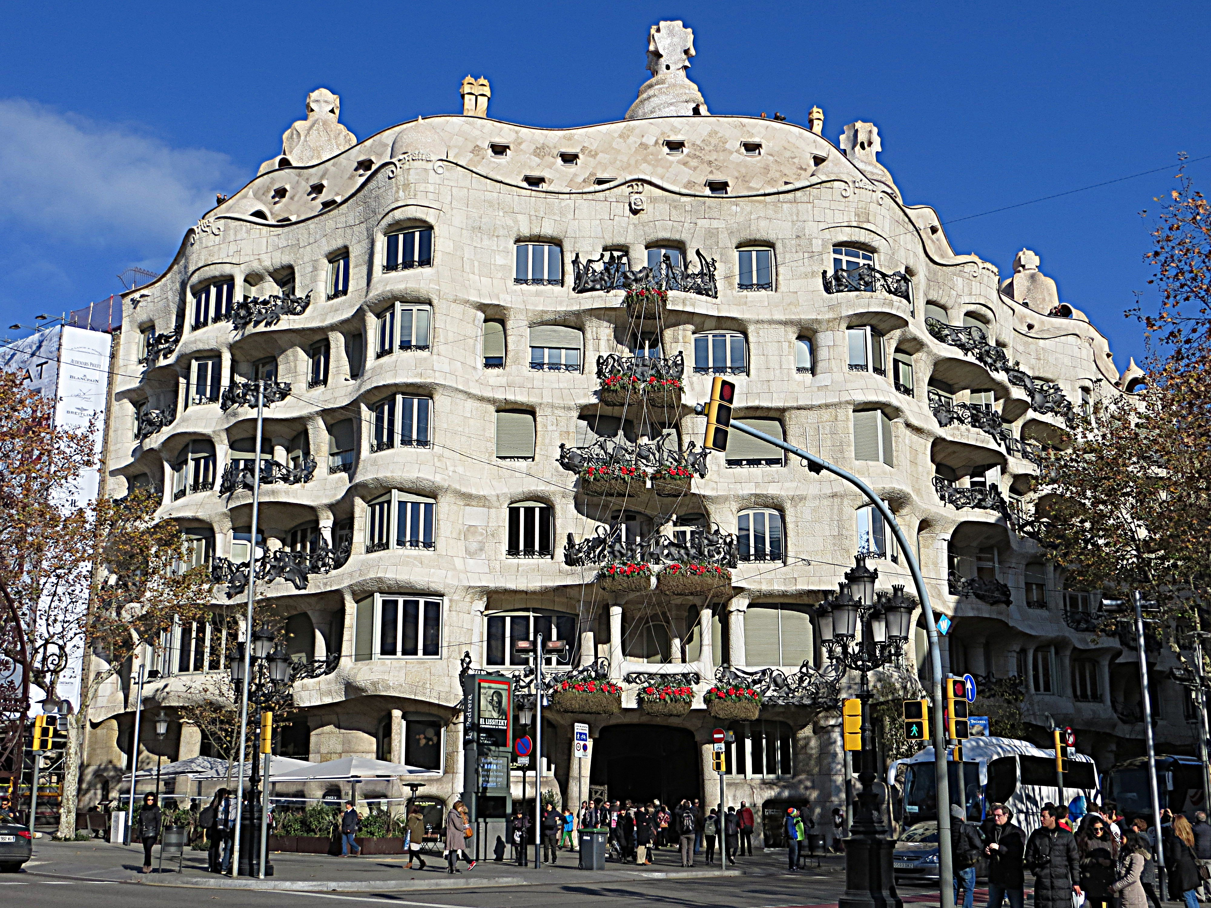 Casa Mila -La Pedrera